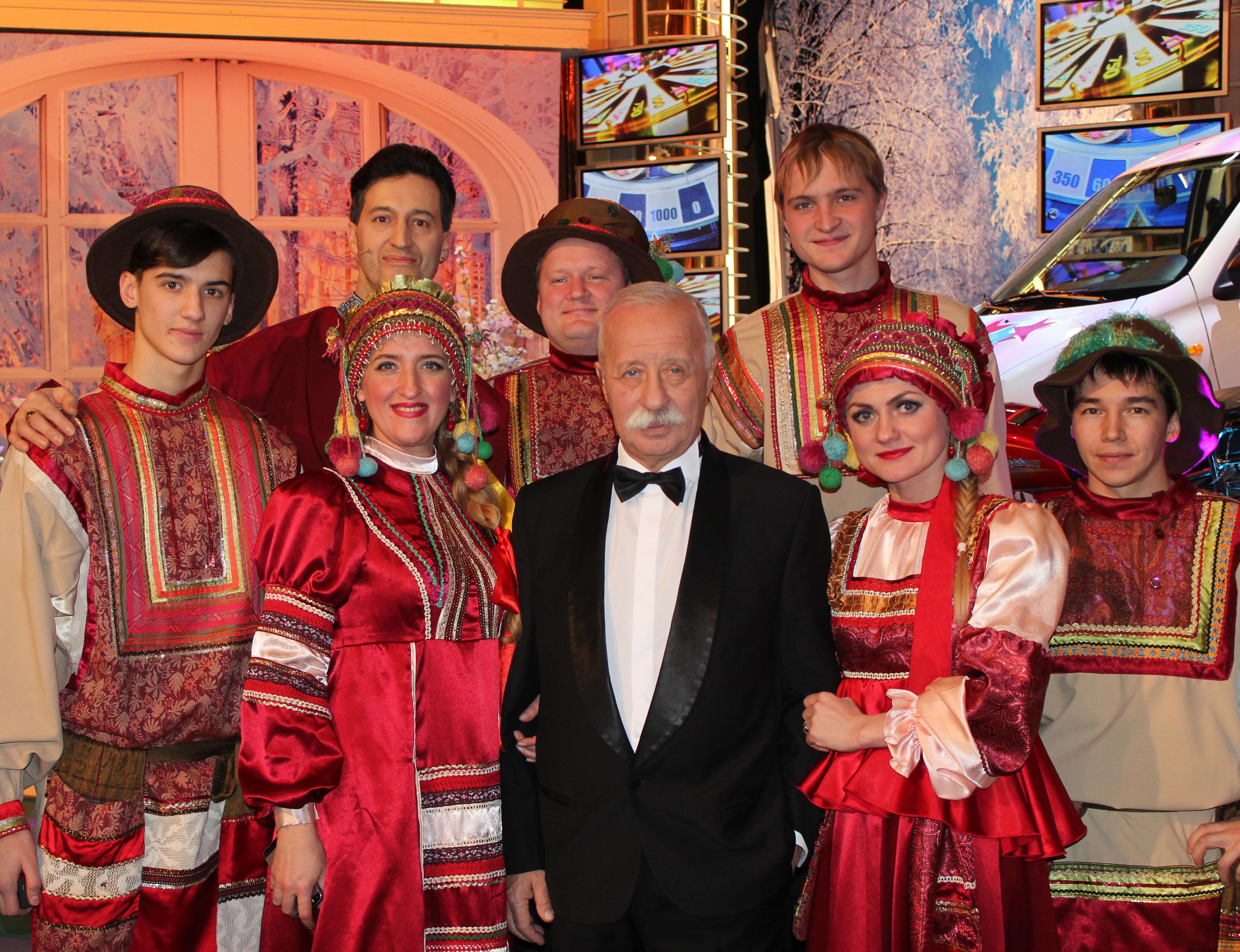 Запись передачи "Поле чудес" с Якубовичем и группой "Колядки"